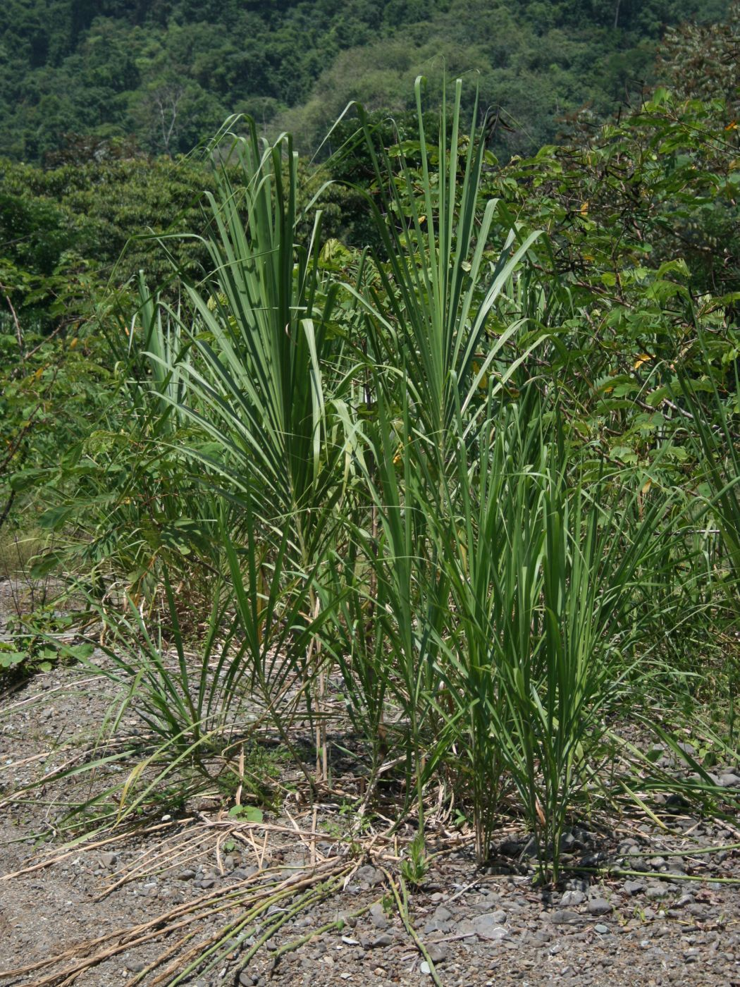 Gynerium sagittatum, Süßgräser (Poaceae) - Costa Rica: Prov. Puntarenas, La Gamba NW Golfito, Valle Bonito